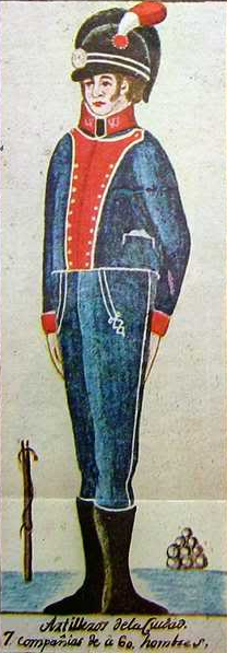 Uniforme de tropa del Regimiento de Artillería de la Unión